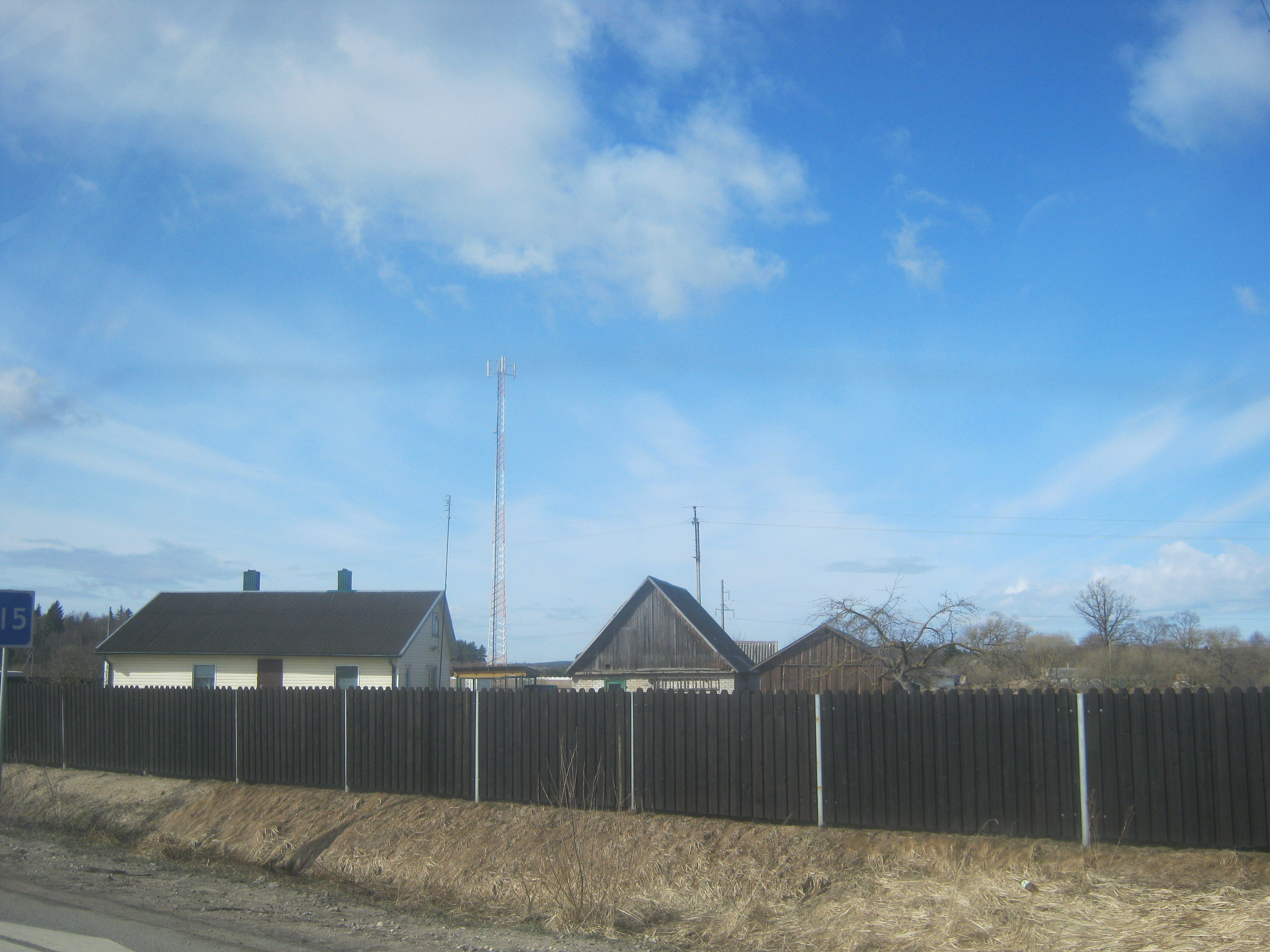 Išorai